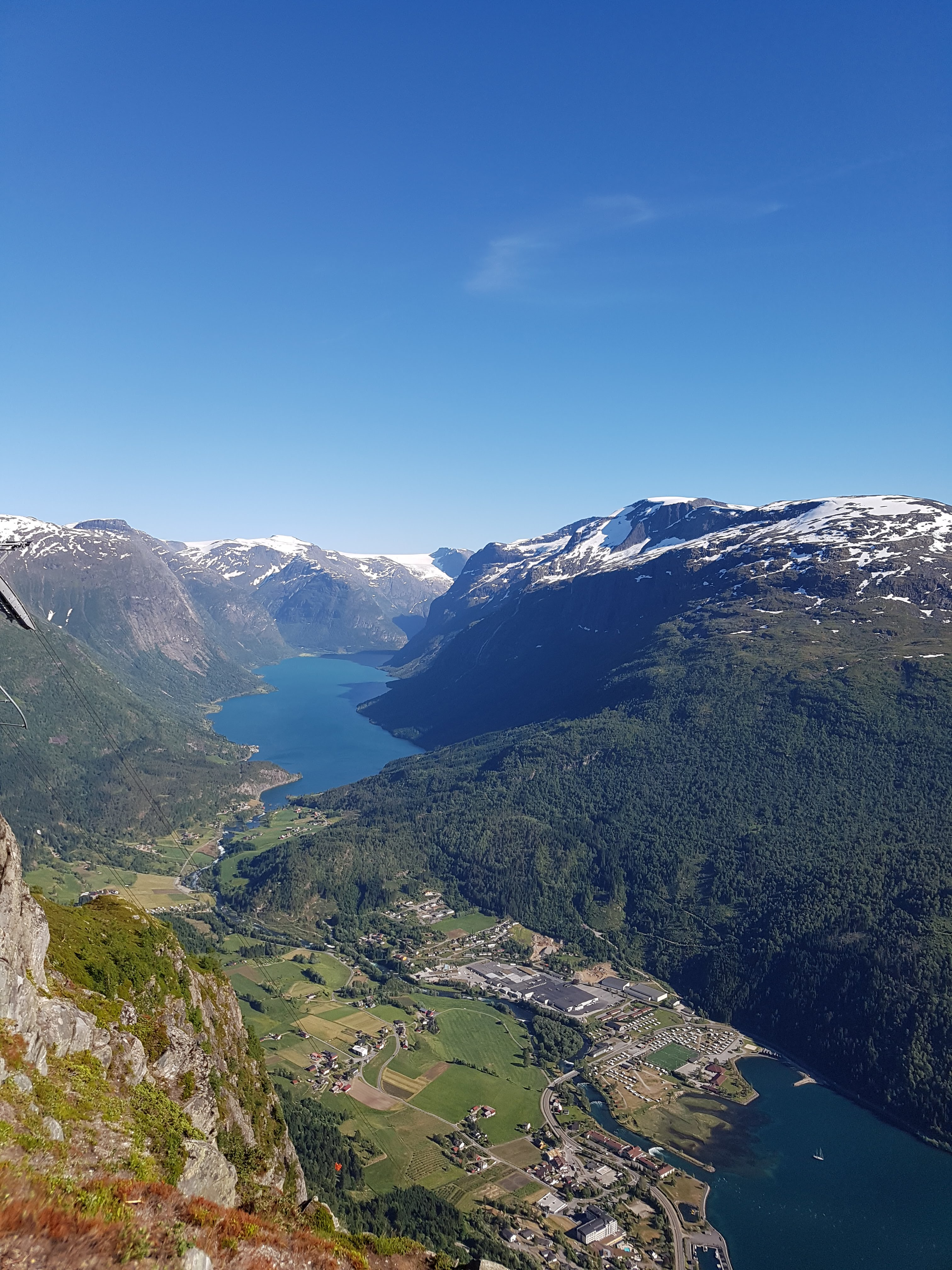 Loen og Lodalen sett fra fjellet Hoven.